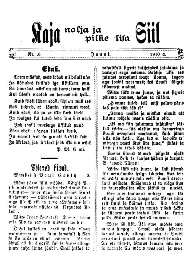 Ajakiri Kaja nalja ja pilke lisa Siil - juuni 1910